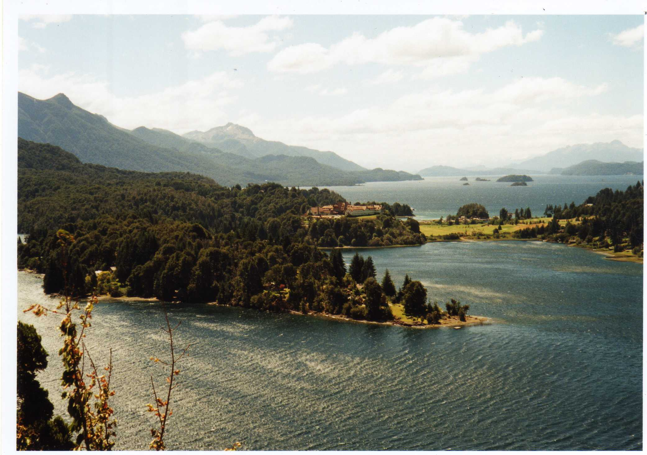 Vista panorámica de San Carlos de Bariloche.